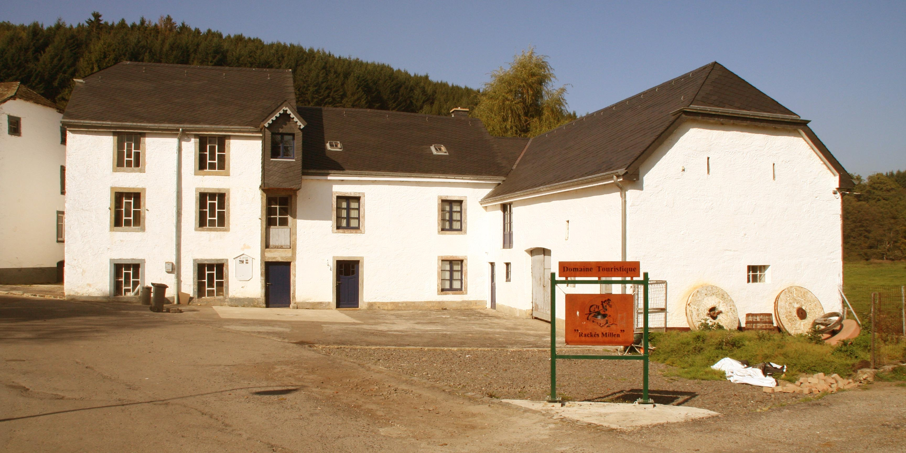 Rackés Millen 3077.